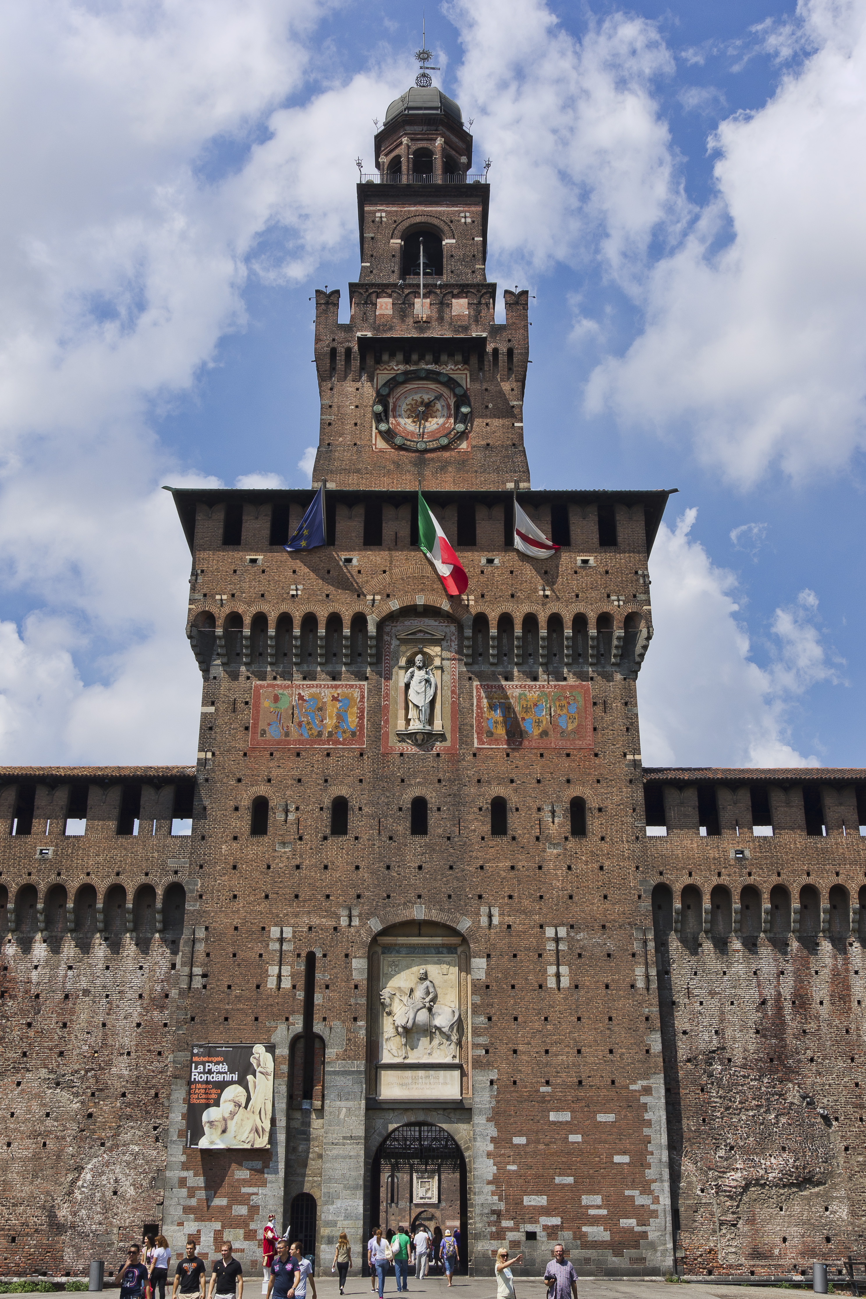 Ingresso principale del Castello Sforzesco di Milano, Italia, attraverso la Torre del Filarete.